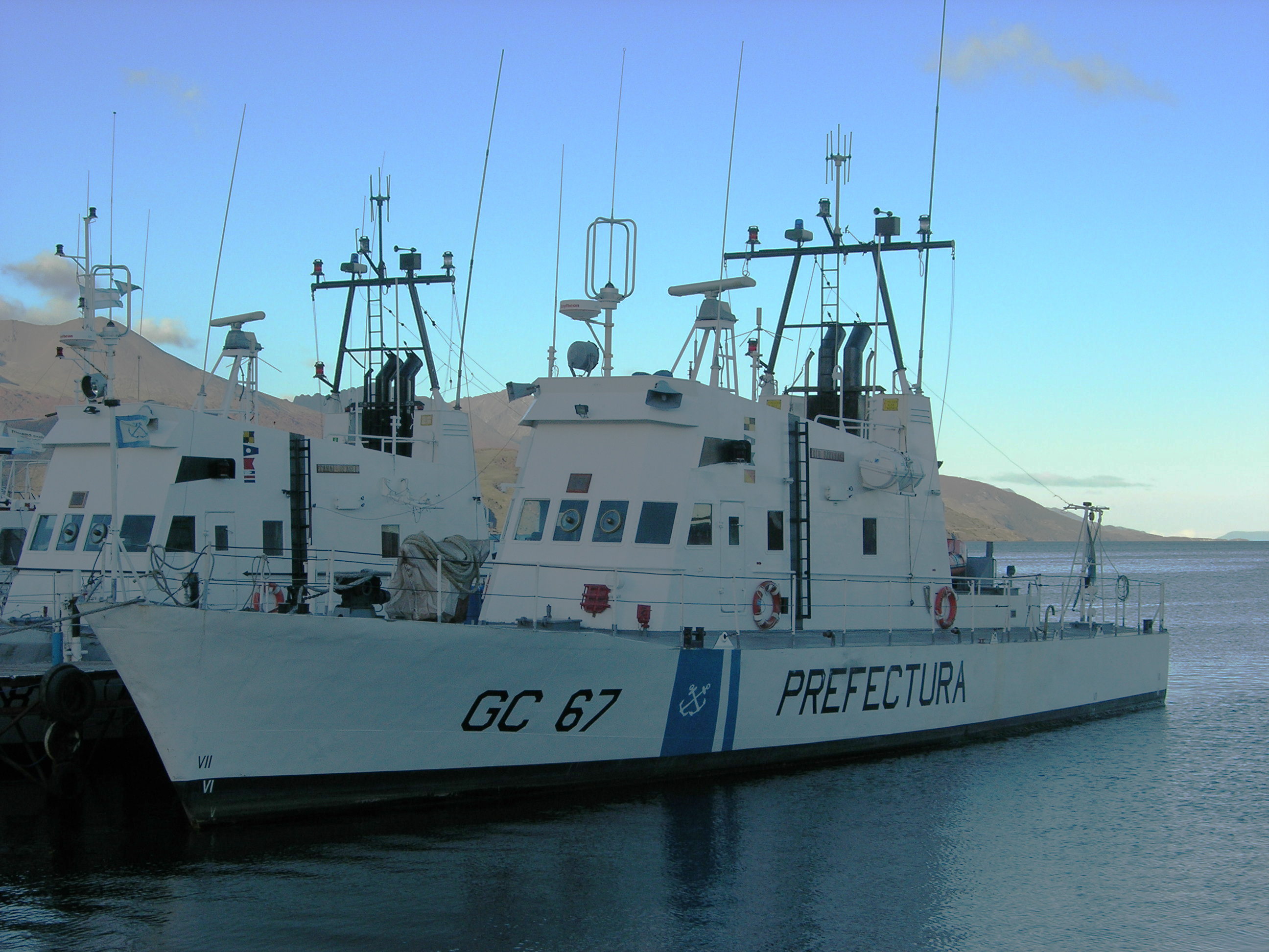 Vedette des gardes cotes dans le port de Ushuaia (Argentine).